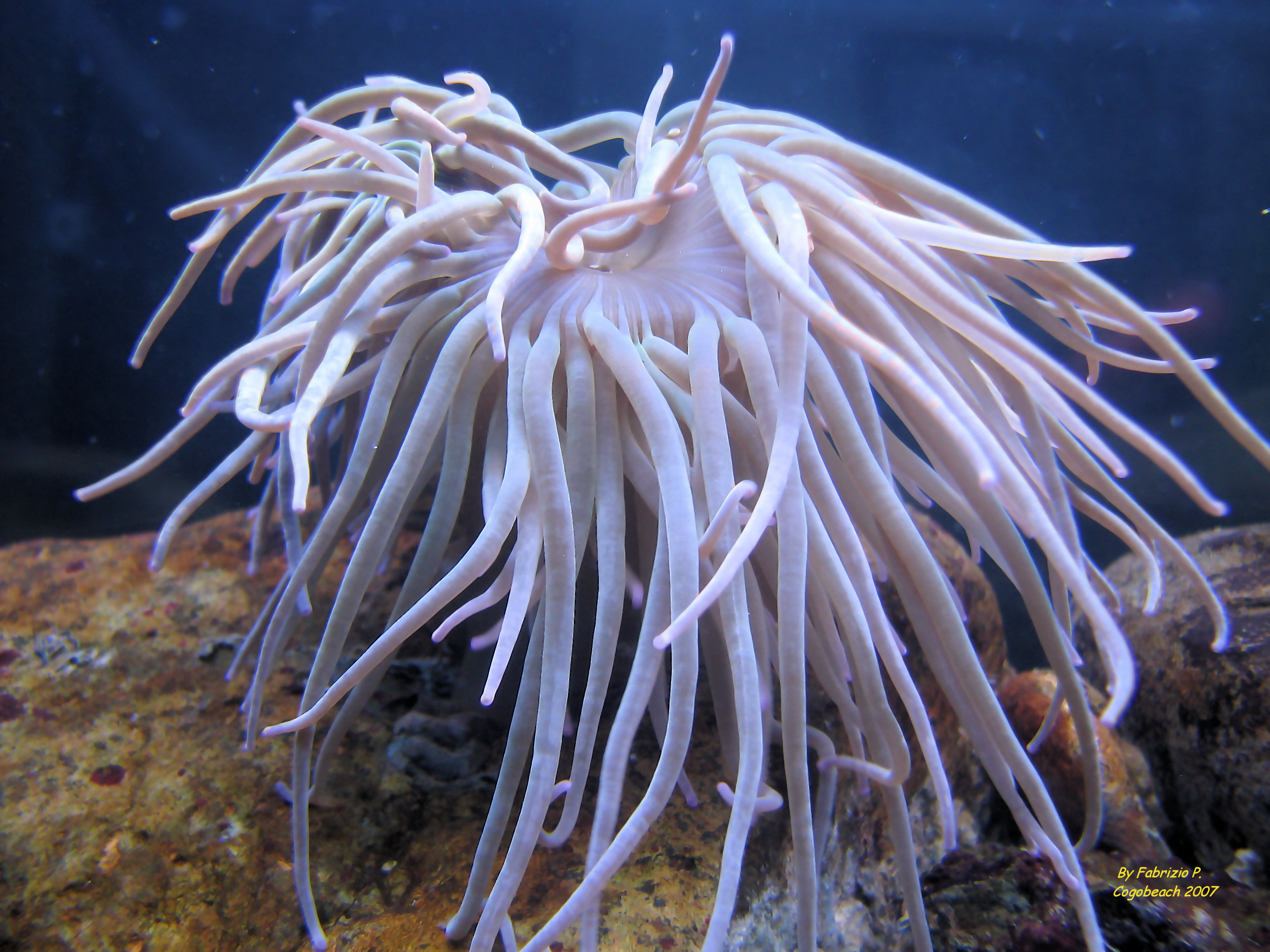 Anemonia sulcata